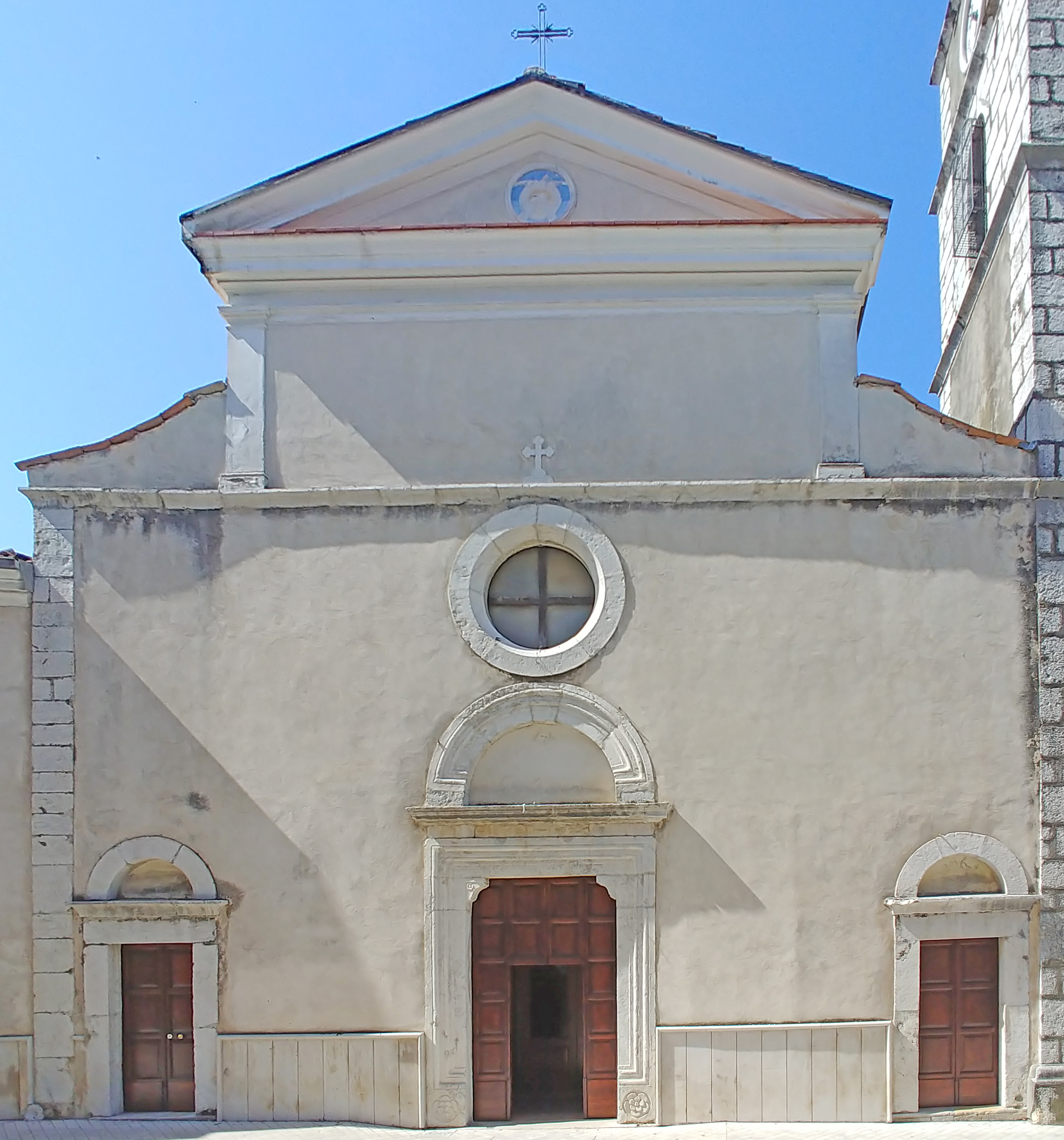 Facciata.